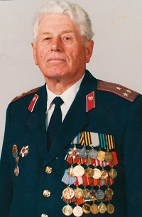 Shevchuk